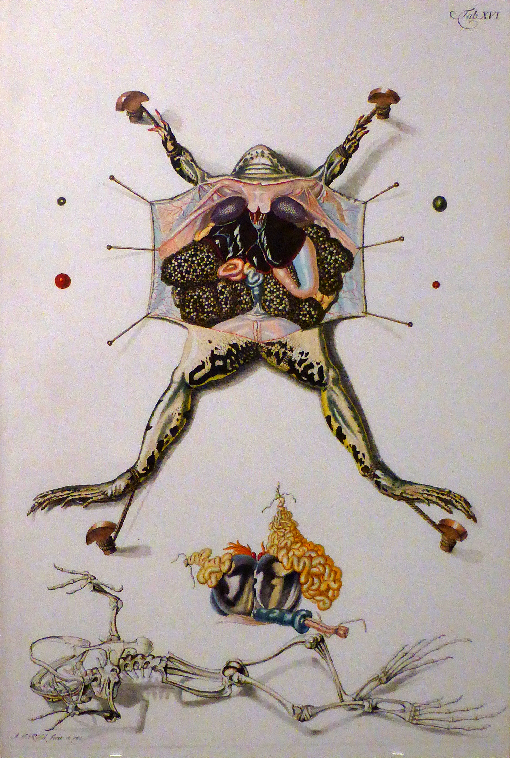 Figure XVI of Historia naturalis ranarum nostratium in qua omnes earum proprietates, praesertim quae ad generationem ipsarum pertinent, fusius enarrantur, Nuremberg: Fleischmann, 1758